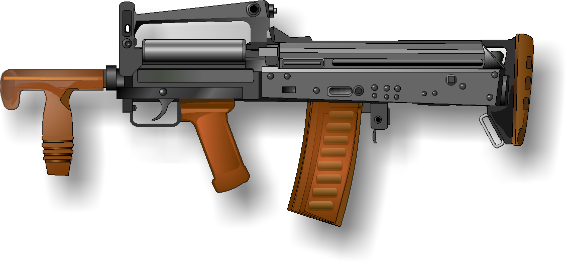 Karabin 9 mm OC-14 Groza(Rosja), wersja podstawowa